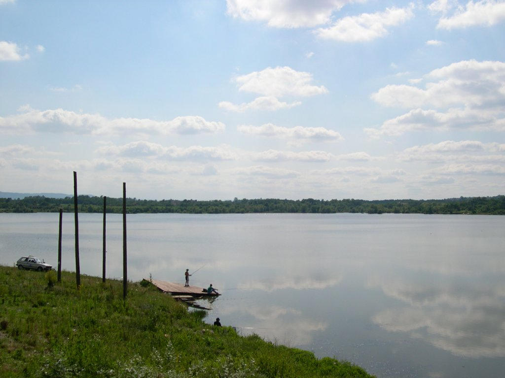 Језеро Виш у селу Паљуви